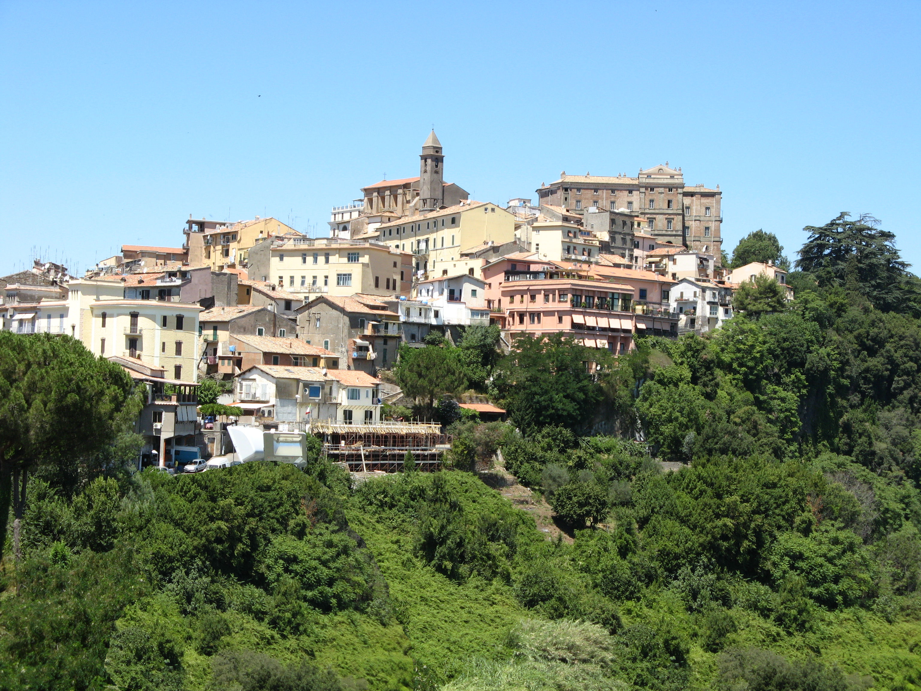 Genzano di Roma, Panorama da Viale Fratelli Cervi. Visibili il borgo (Genzano Vecchio), il Palazzo Cesarini, la Chiesa di Santa Maria della Cima